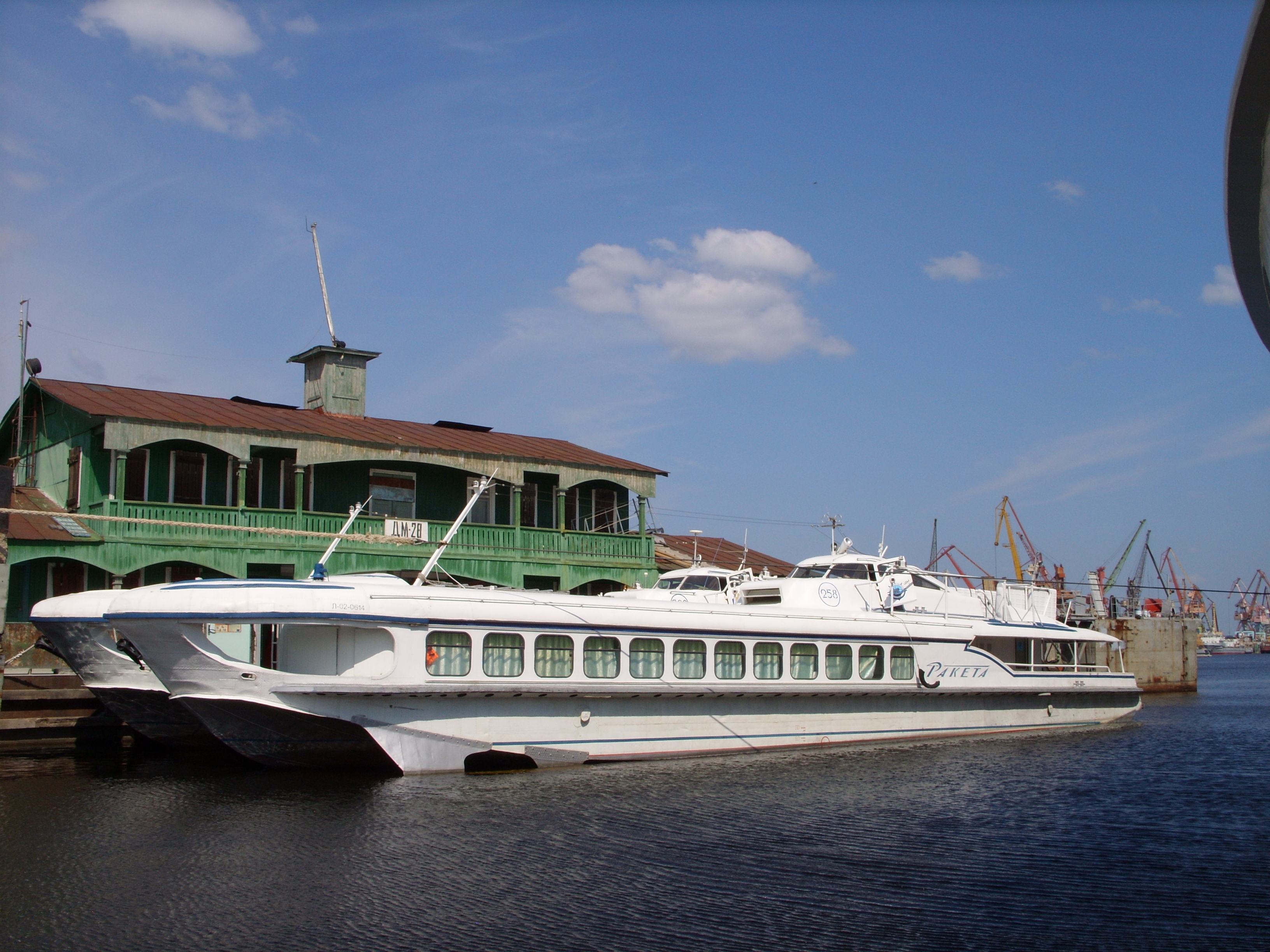 снимок 2014 г.